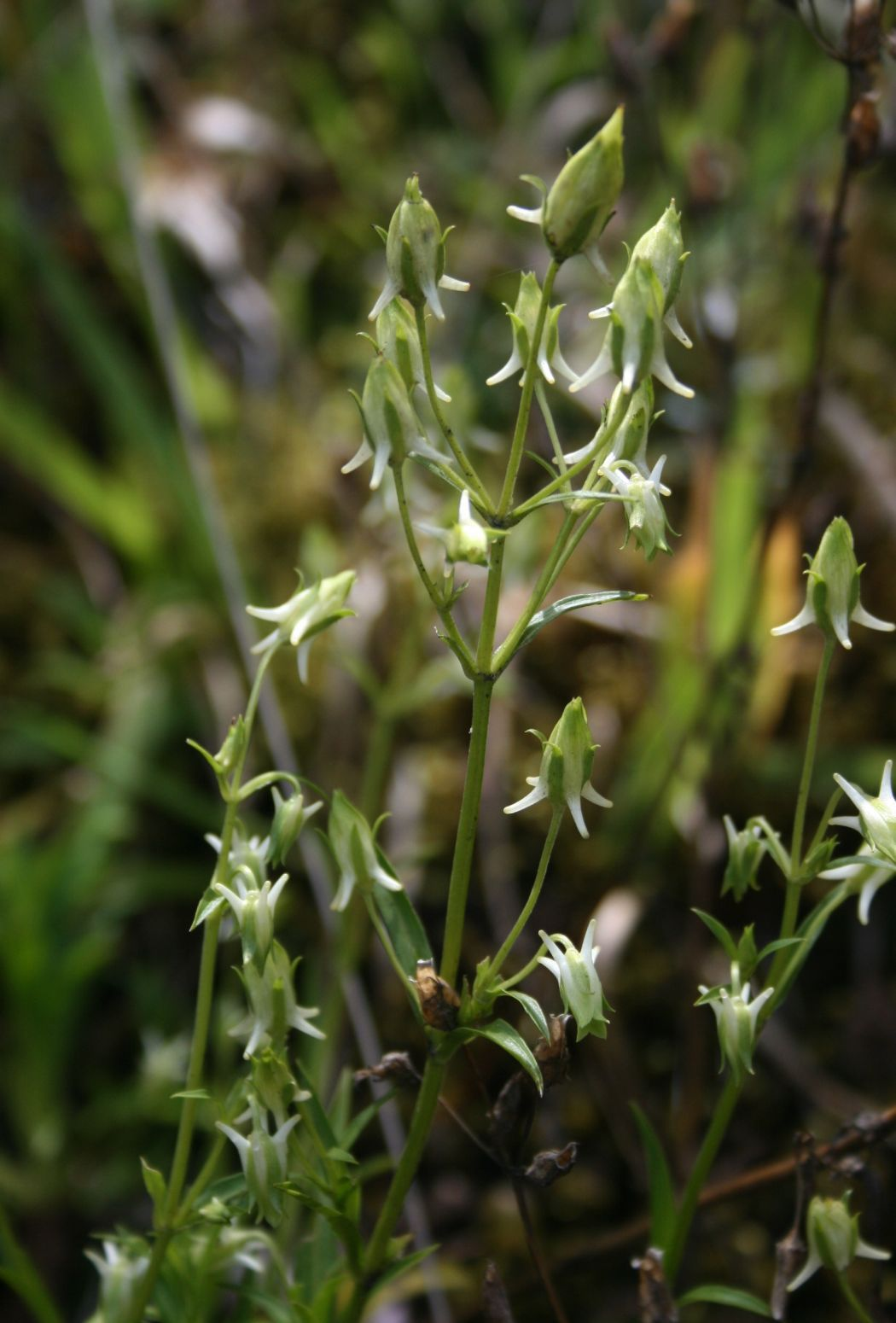 Halenia rhyacophila, Enziangewächse (Gentianaceae) - Costa Rica: Prov. Cartago, Cordillera de Talamanca, Carretera Interamericana N Cerro de la Muerte, ca. km 86, ca. 3150 m